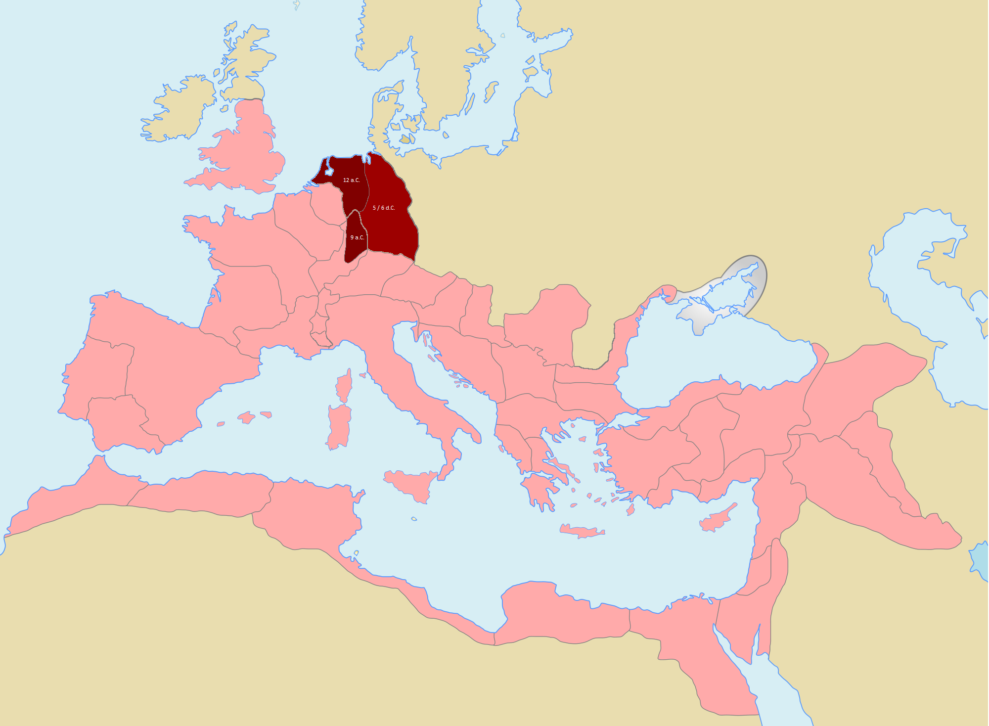 Germania provincia romana 12 a.C. - 9 d.C.